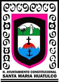 Escudo del Municipio de Santa Maria Huatulco